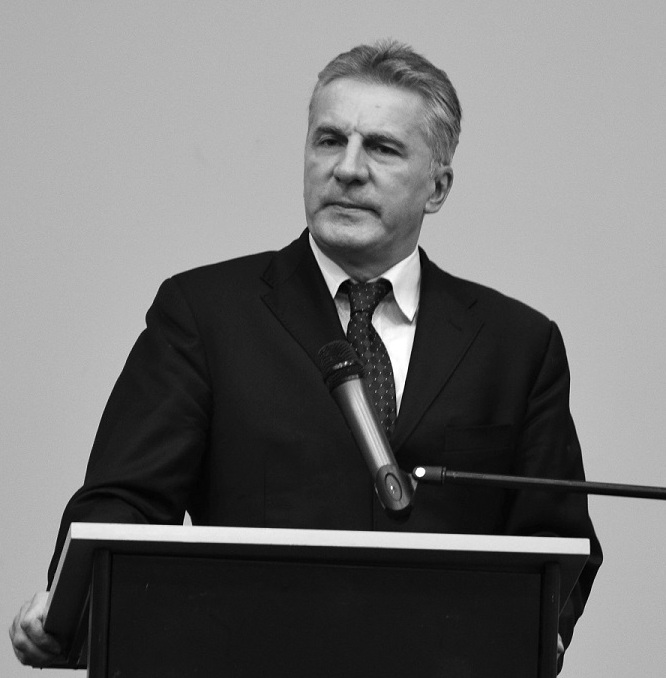 JUDr. Robert Fremr